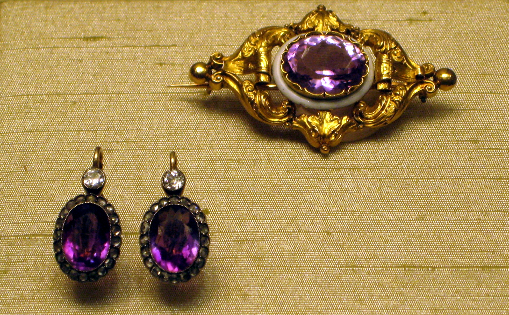 Брошь. 1857-64. Мастер А. Хольстрем. Аметист, золото. Государственный музей "Петергоф". Серьги. СПб, 1908-17. Шестая артель (?). Аметисты, бриллианты. Музеи Московского Кремля